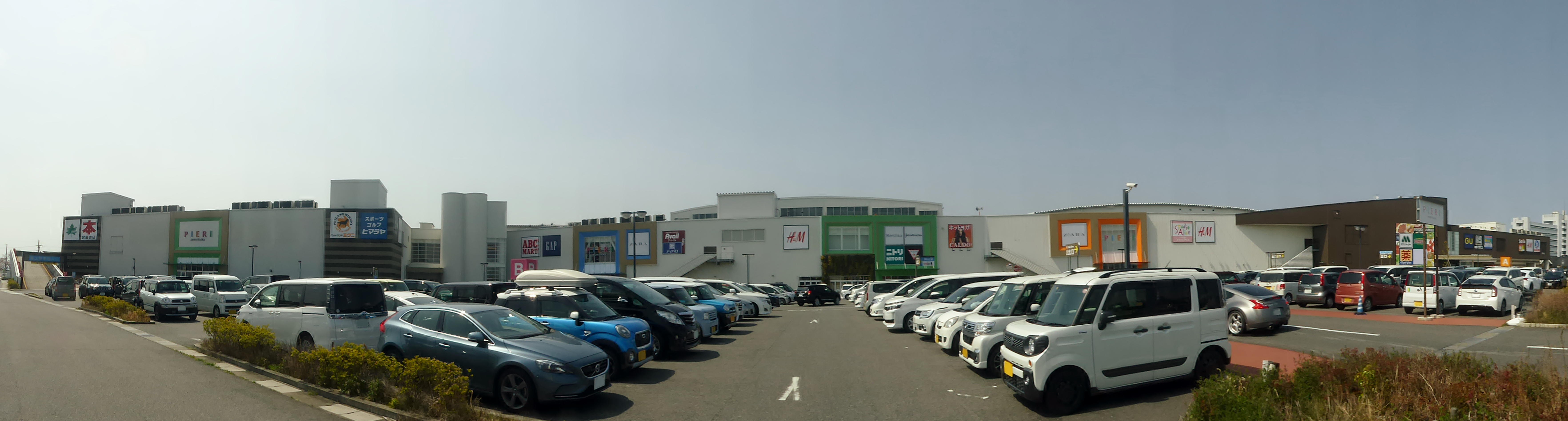 ピエリ守山を撮影。